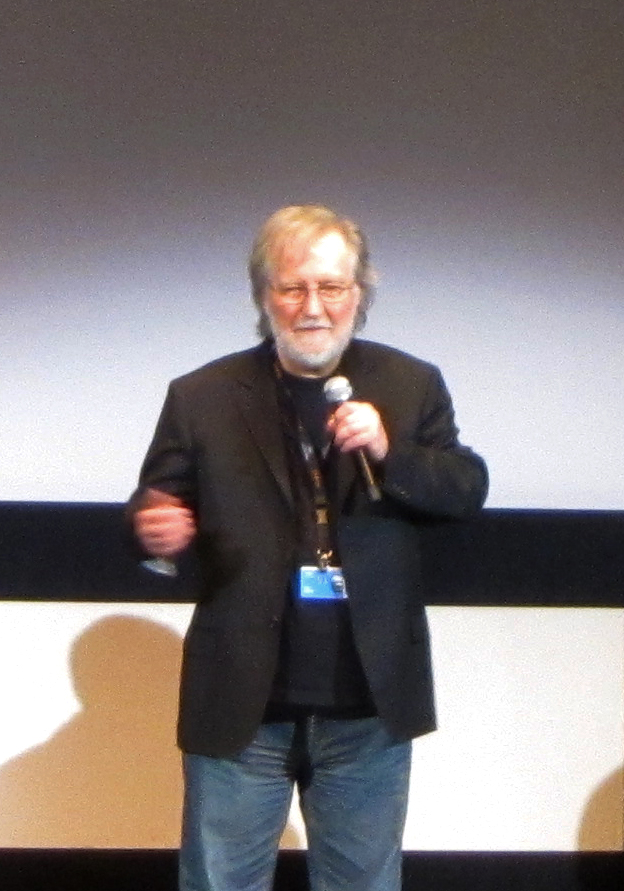 Tobe Hooper lors de la projection de Massacre à la tronçonneuse (version restaurée) à la Quinzaine des réalisateurs du Festival de Cannes 2014.